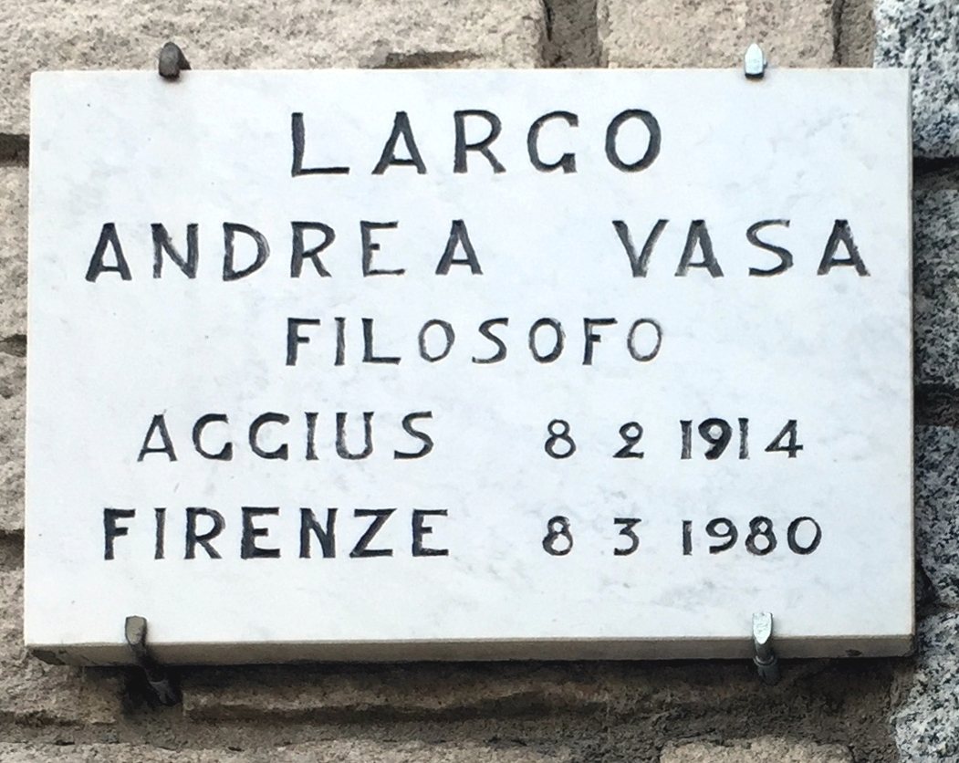 Image d'Aggius, Sardaigne, août 2015.